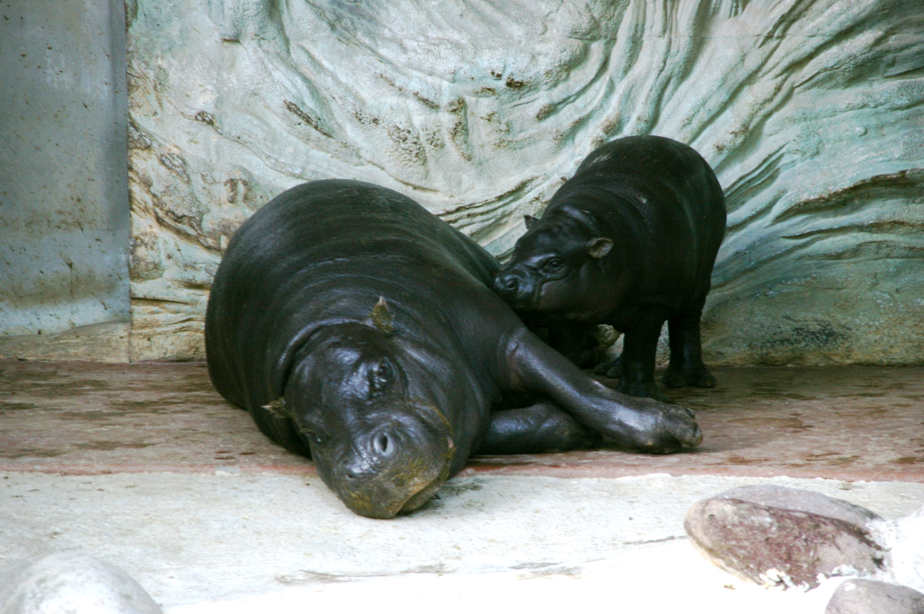 Ueno zoo, Tokyo, Japan